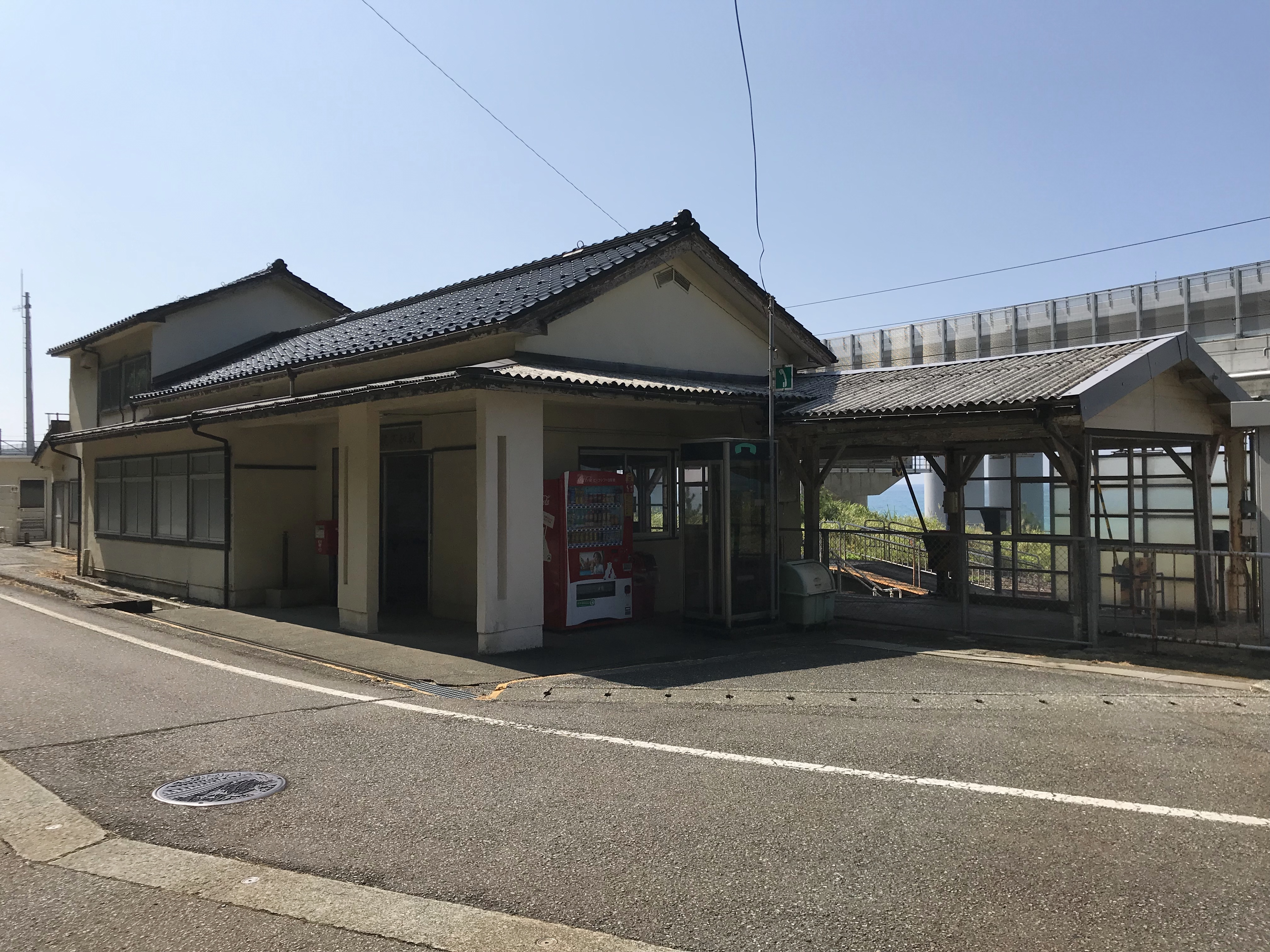 えちごトキめき鉄道日本海ひすいライン親不知駅駅舎